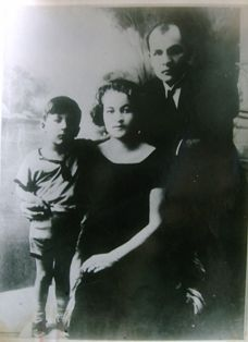 Полномочный представитель СССР в Королевстве Саудовская Аравия Карим Хакимов с супругой Хадичой и сыном Шамилем